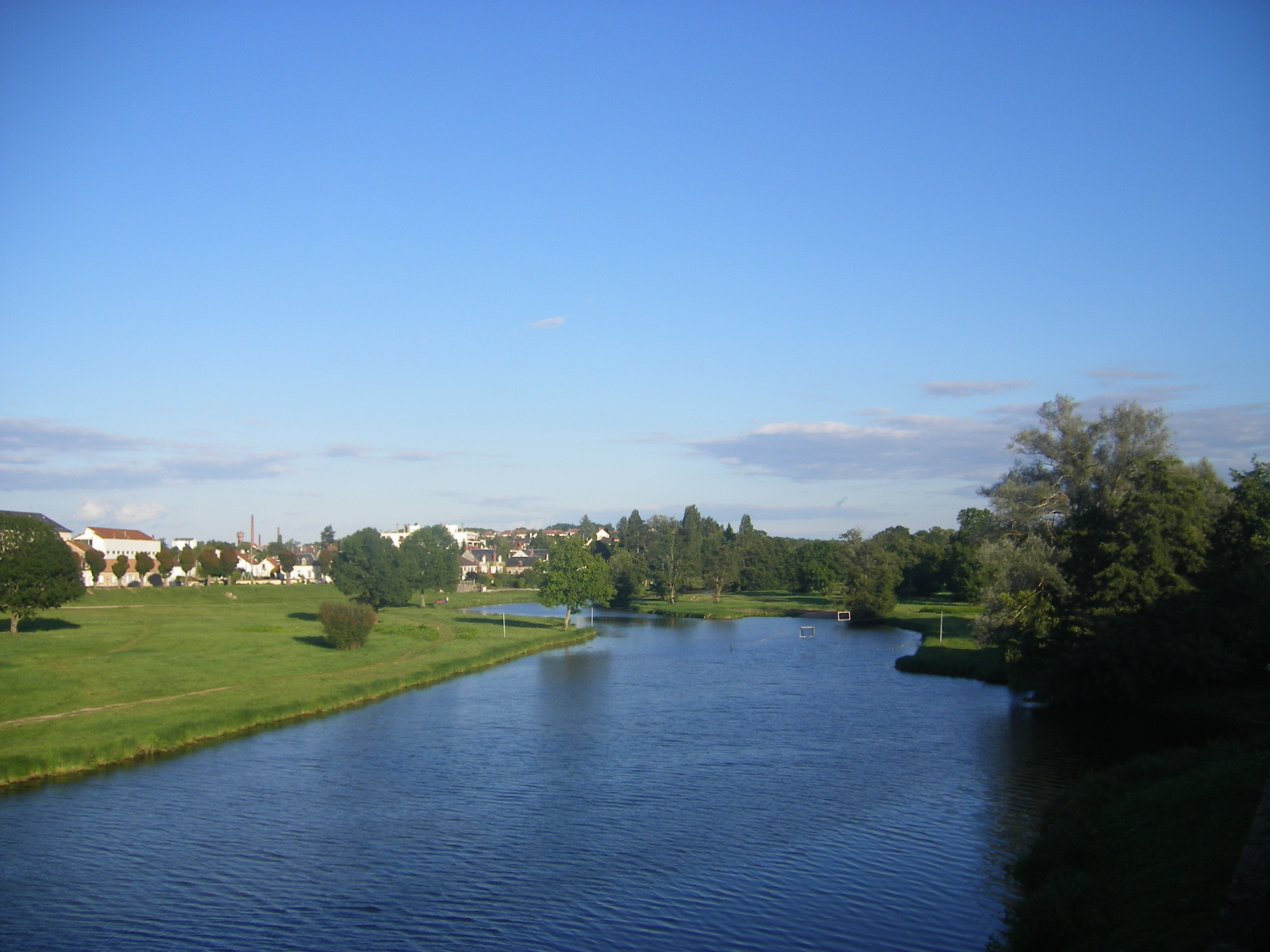 Decize - Vieille Loire